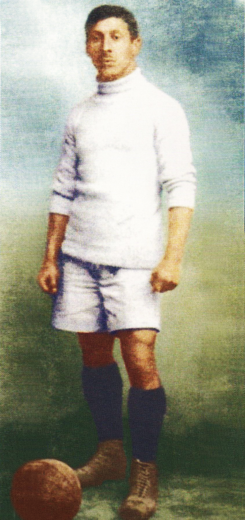 Φωτογραφία του Γιώργου Καλαφάτη κατά πρώτη δεκαετία του 1900, από άγνωστο δημιουργό. Επίσης δεν είναι γνωστό με ποιας ομάδας τα χρώματα αγωνίζεται. Η χρωματική επεξεργασία έγινε από το χρήστη Sportingn